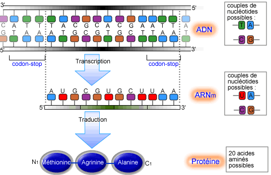 Auteur : Ggbb sous licence GFDL Ggbb Attention: le premier acide aminÃ© encadrÃ© c'est la mÃ©thyl-mÃ©thionine (chez les cellules eucaryotes)